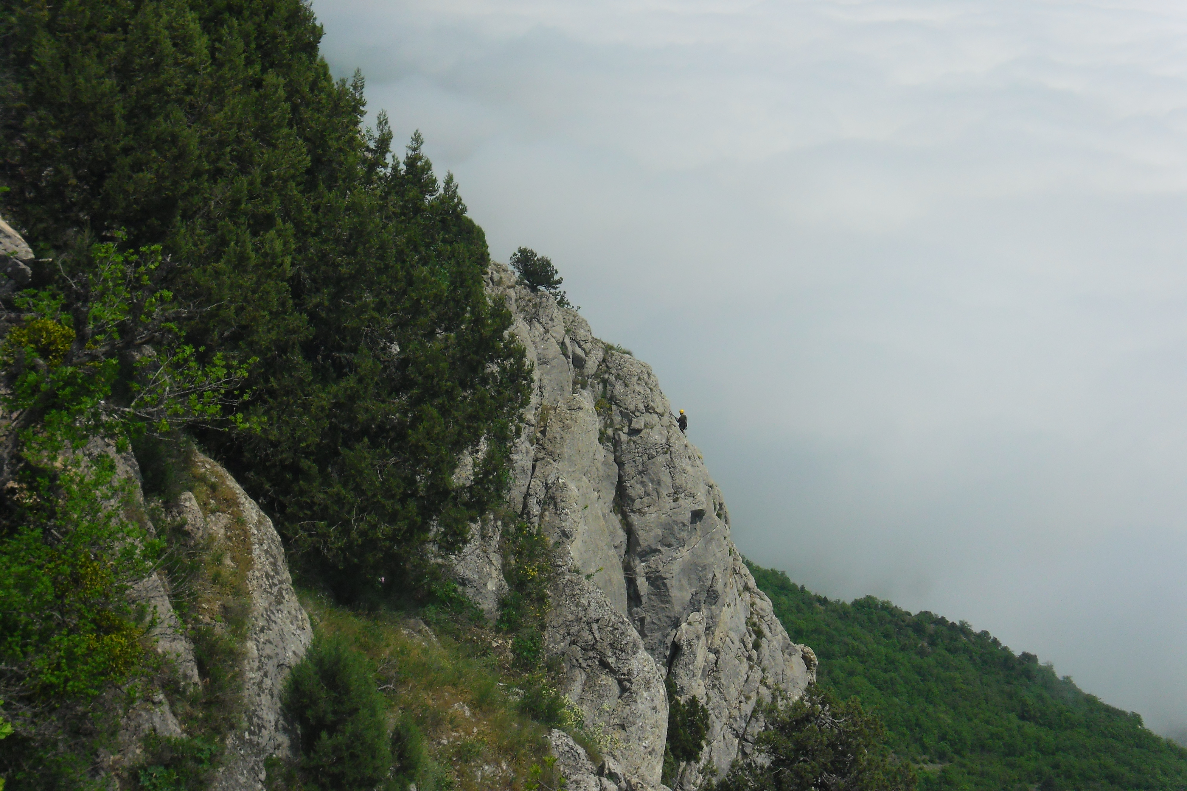 Фото